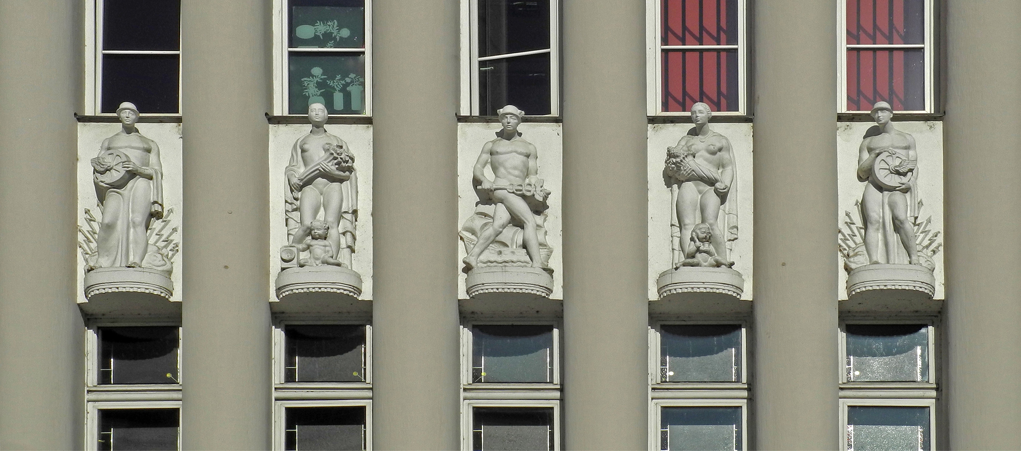 Eingangsportal zum Verwaltungsgebäude der Nordböhmische Elektrizitätswerke AG, jetzt Zweigstelle der Tschechischen Elekrizitätswerke (ČEZ) in Tetschen-Bodenbach - Děčín IV-Podmokly, Teplická 874/8; Architekt: Rudolf Bitzan. Skulpturen von Georg Türke (1884–1972).